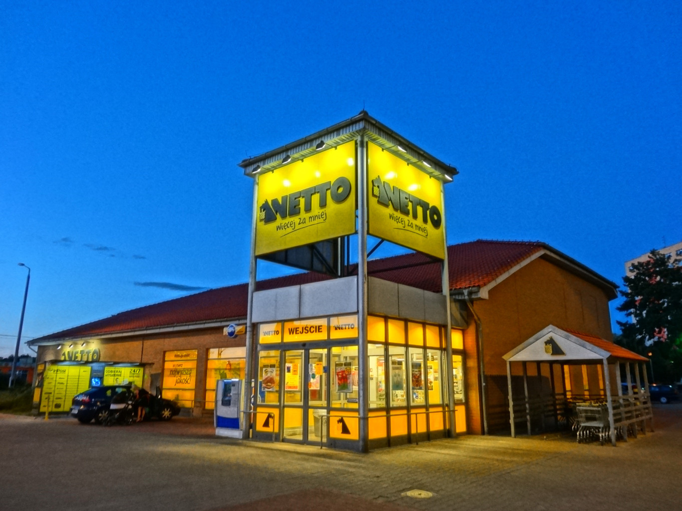 Dyskont Netto na osiedlu Wzgórze Wolności w Bydgoszczy